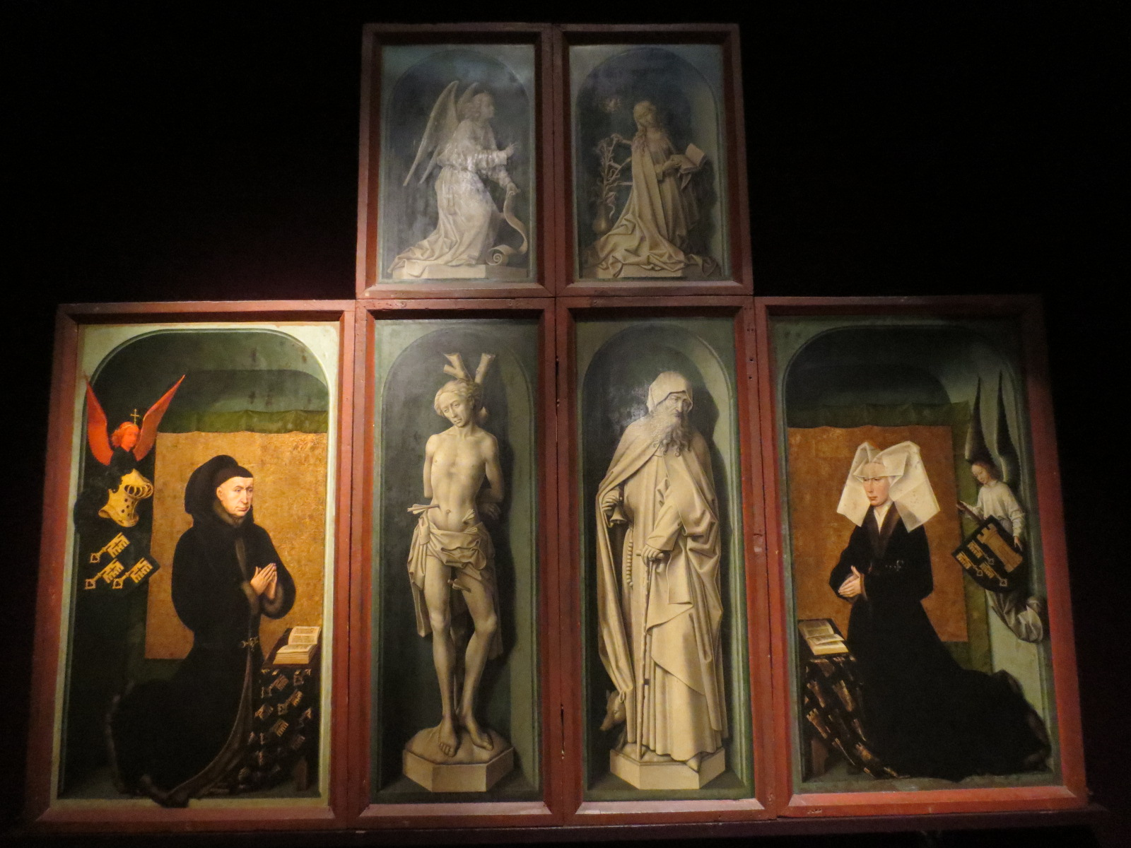 Polyptyque Hôtel-Dieu de Beaune, Polyptyque du Jugement dernier (fermé), par Rogier van der Weyden